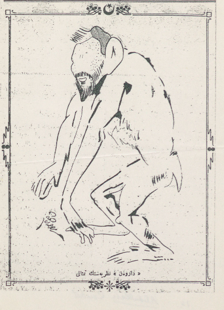 This work first published in the Ottoman Empire is now in the public domain because the Empire's copyright formalities were not met (copyright notice, registration, and deposit), or because the copyright term (30 years after the death of the author, sometimes less) expired before the Empire was dissolved (details).